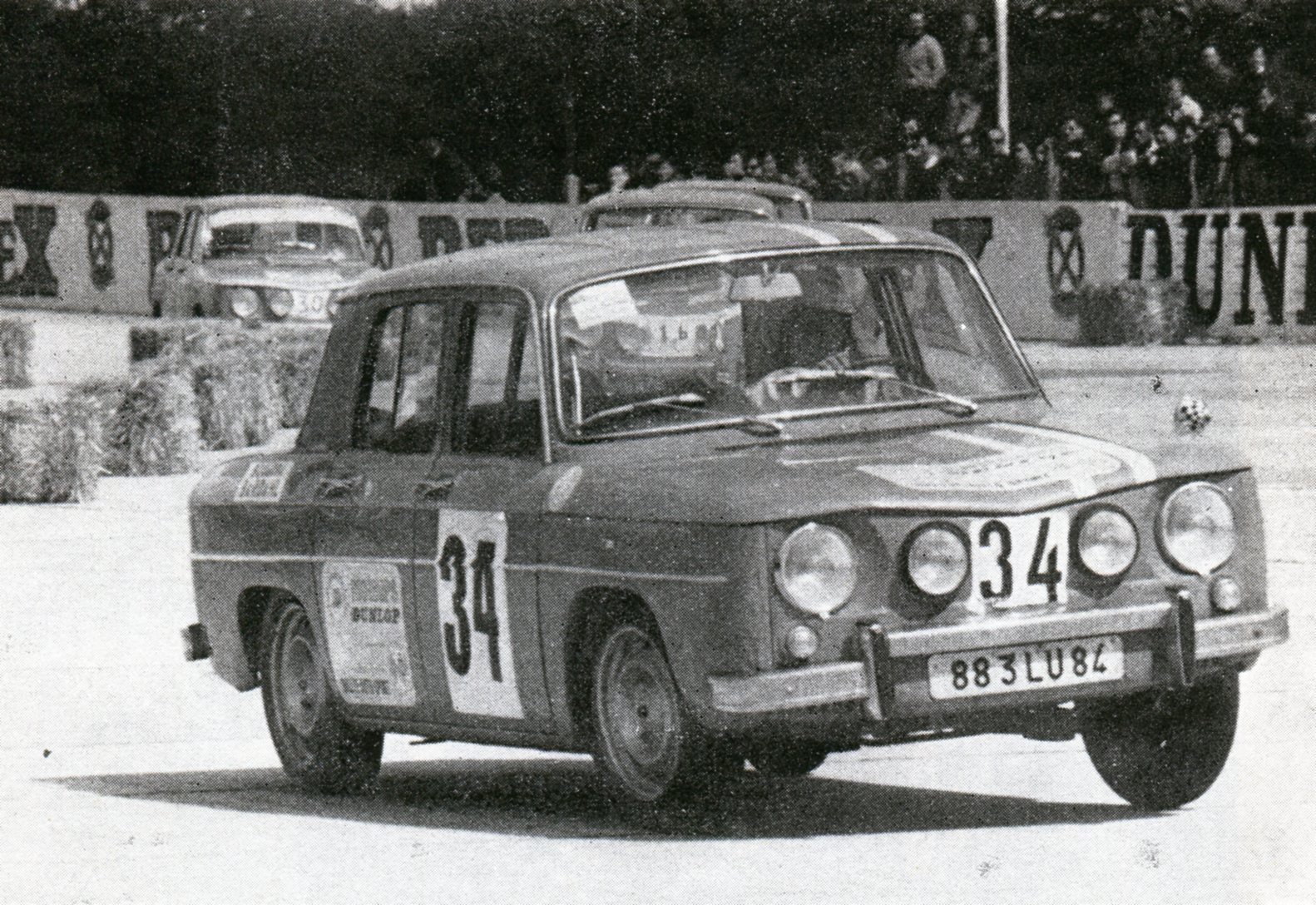 Ragnotti pilota della Squadra Piloti Bardahl